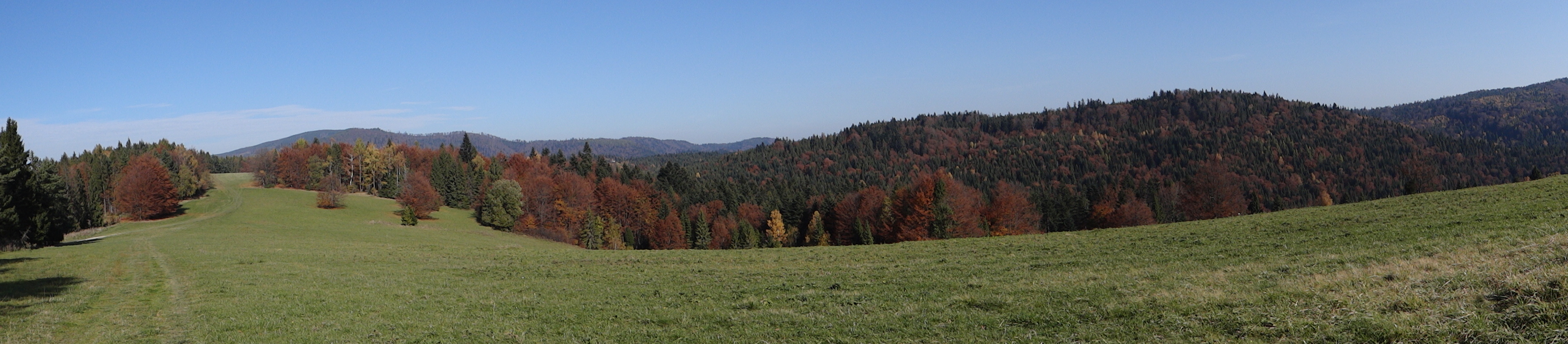 panorama z Litmanowskich łąk na Gromadzka Przełęćz, Beskid Sądecki, Okrúhlę